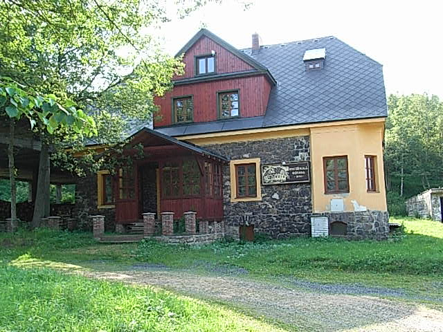 Ehemalige Weißeritzbaude in Nové Město